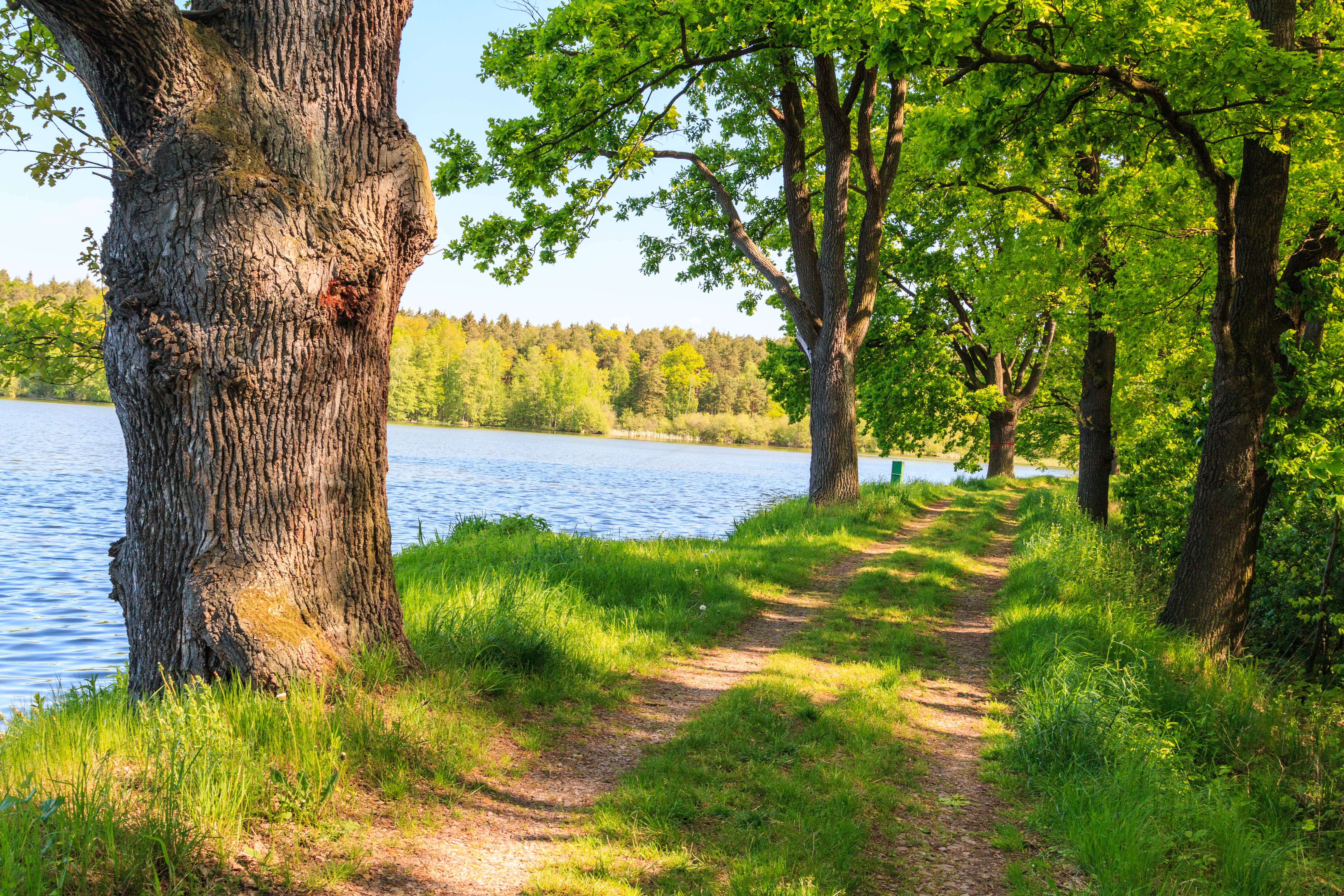 Památné duby na hrázi rybníka Pařezný Project: Chráněná území.